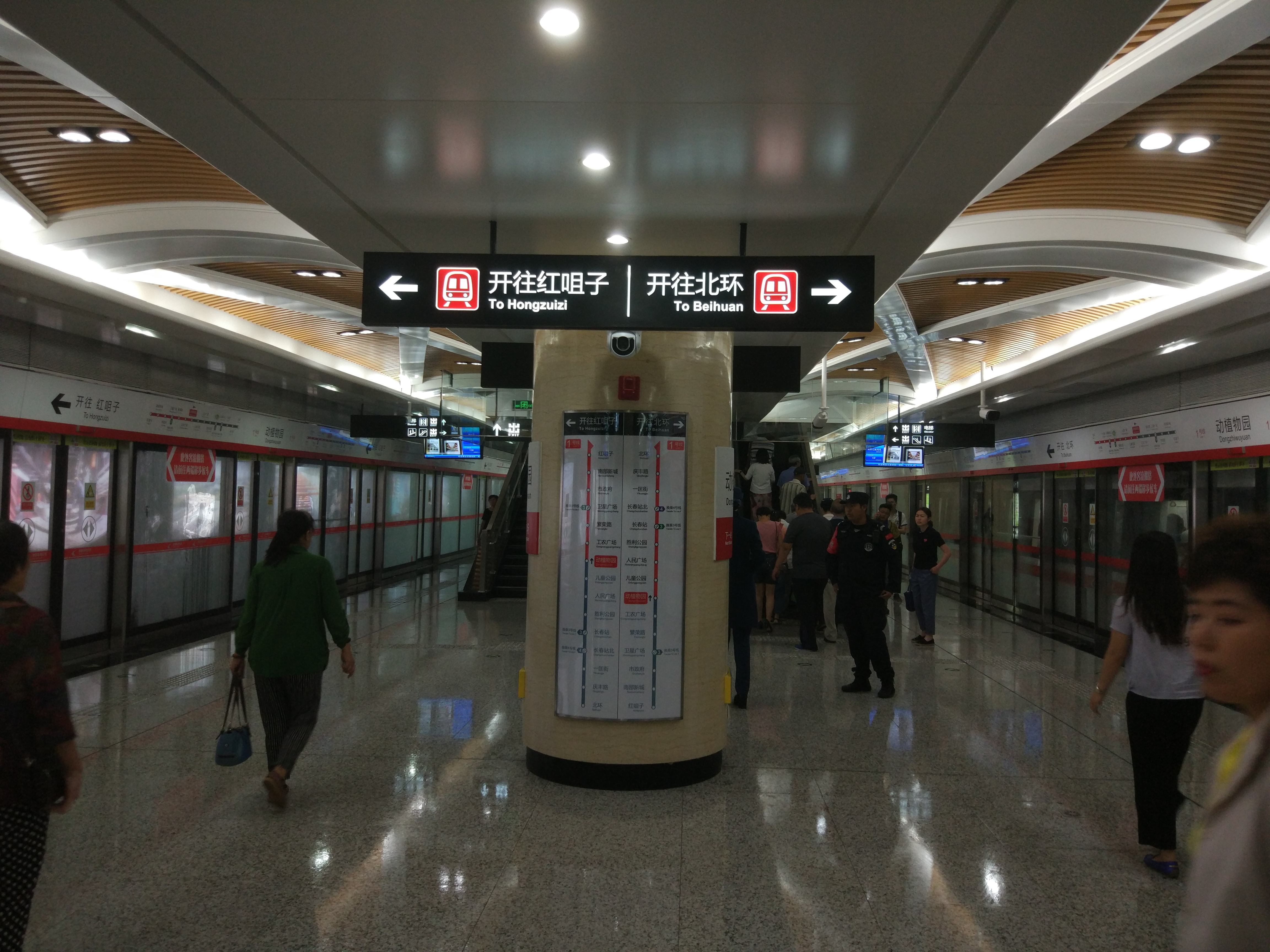 长春地铁自由大路站站台